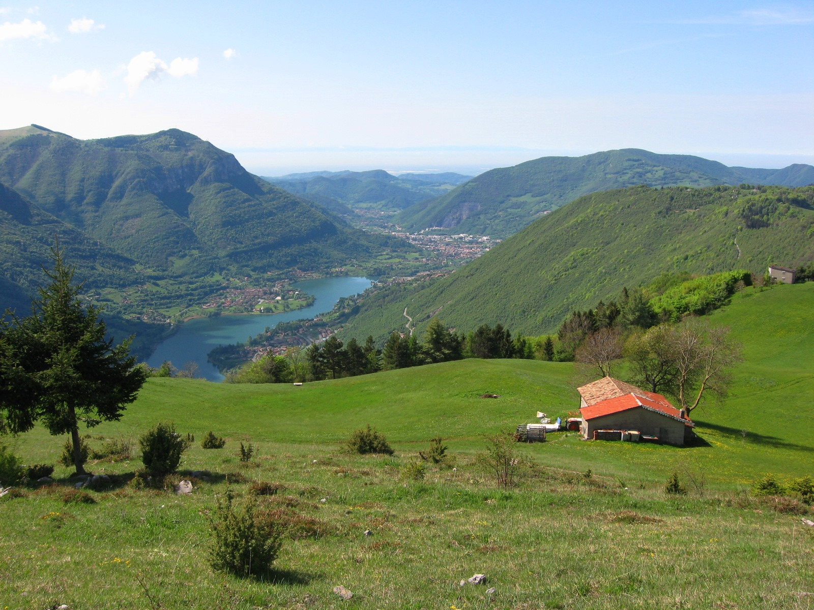 Valle Cavallina e lago di Endine vista dalla loc. Monticelli